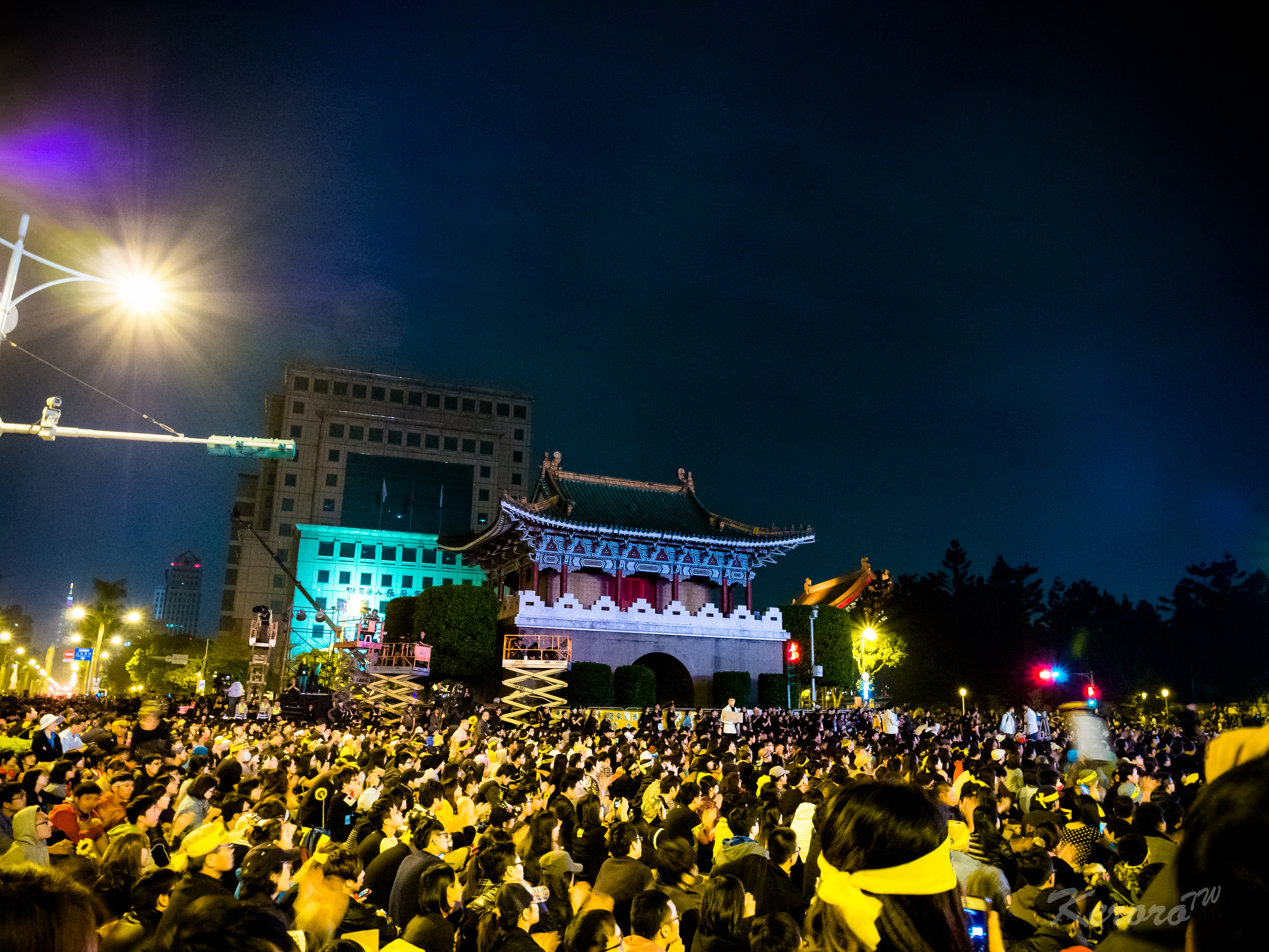 OLYMPUS DIGITAL CAMERA 2014-03-30 太陽花在凱道